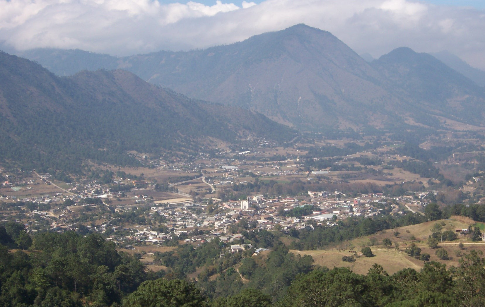 Panorámica de Tetela desde Barranca Fría. Nāhuatl: Tetellān de Ocampo.